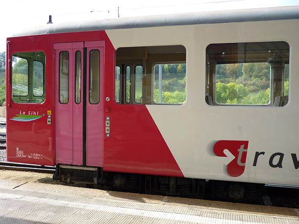 La Sihl, des Travys à Orbe.